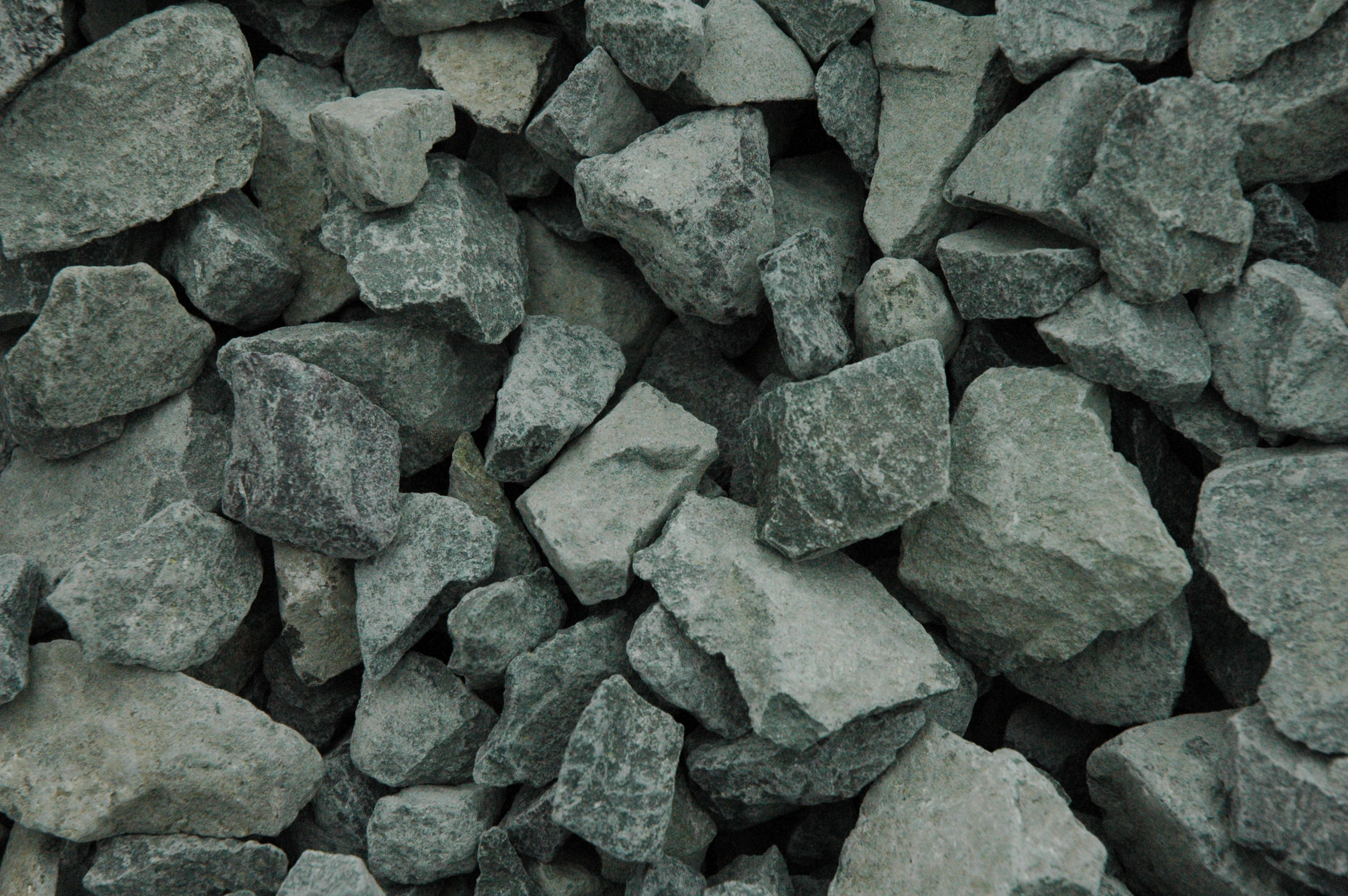 Порфиритовый щебень